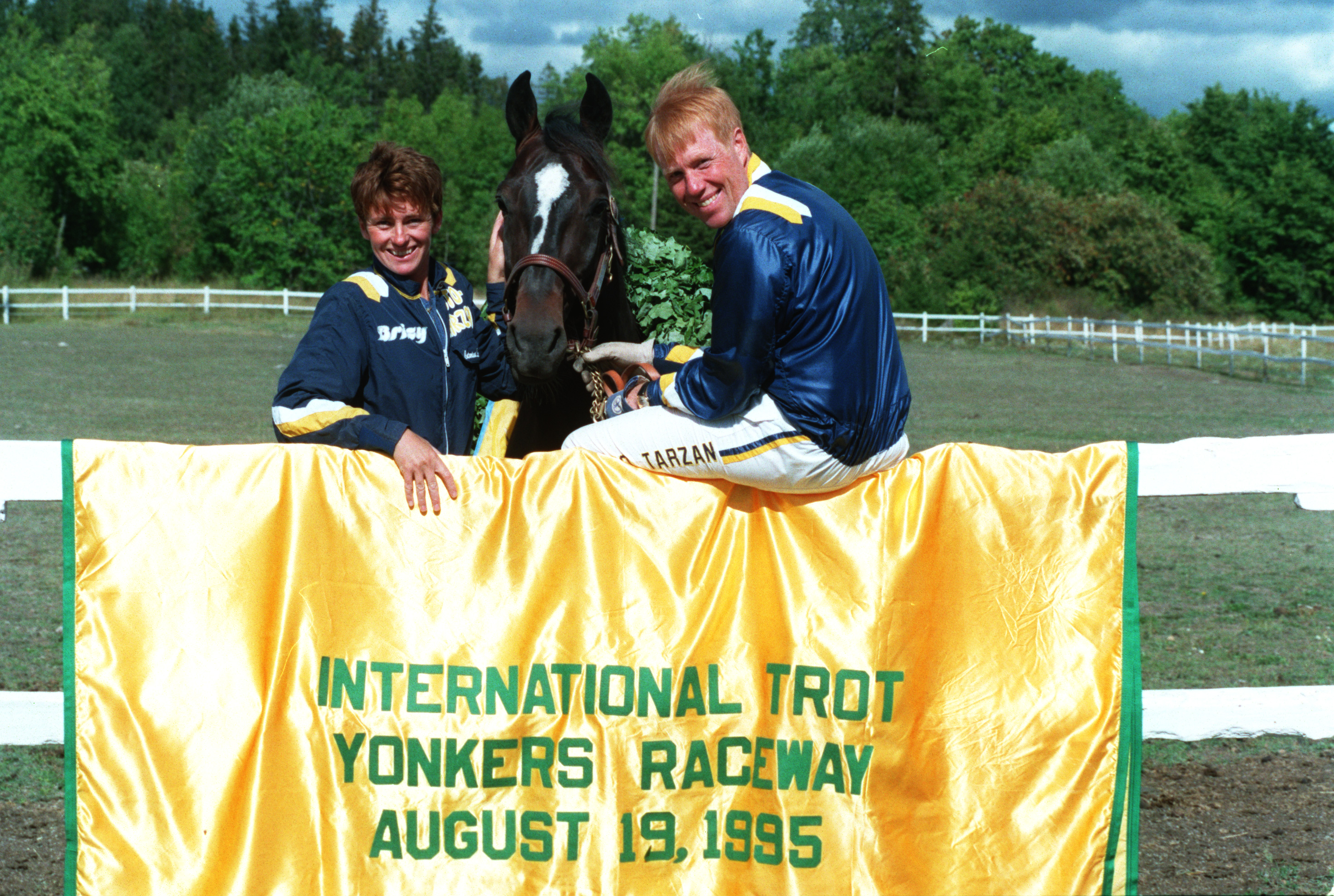 duon vid staket med vm-täcke 1995.(lundströms/melanders gård.) fotograf: referens:951853-7 place:enköping